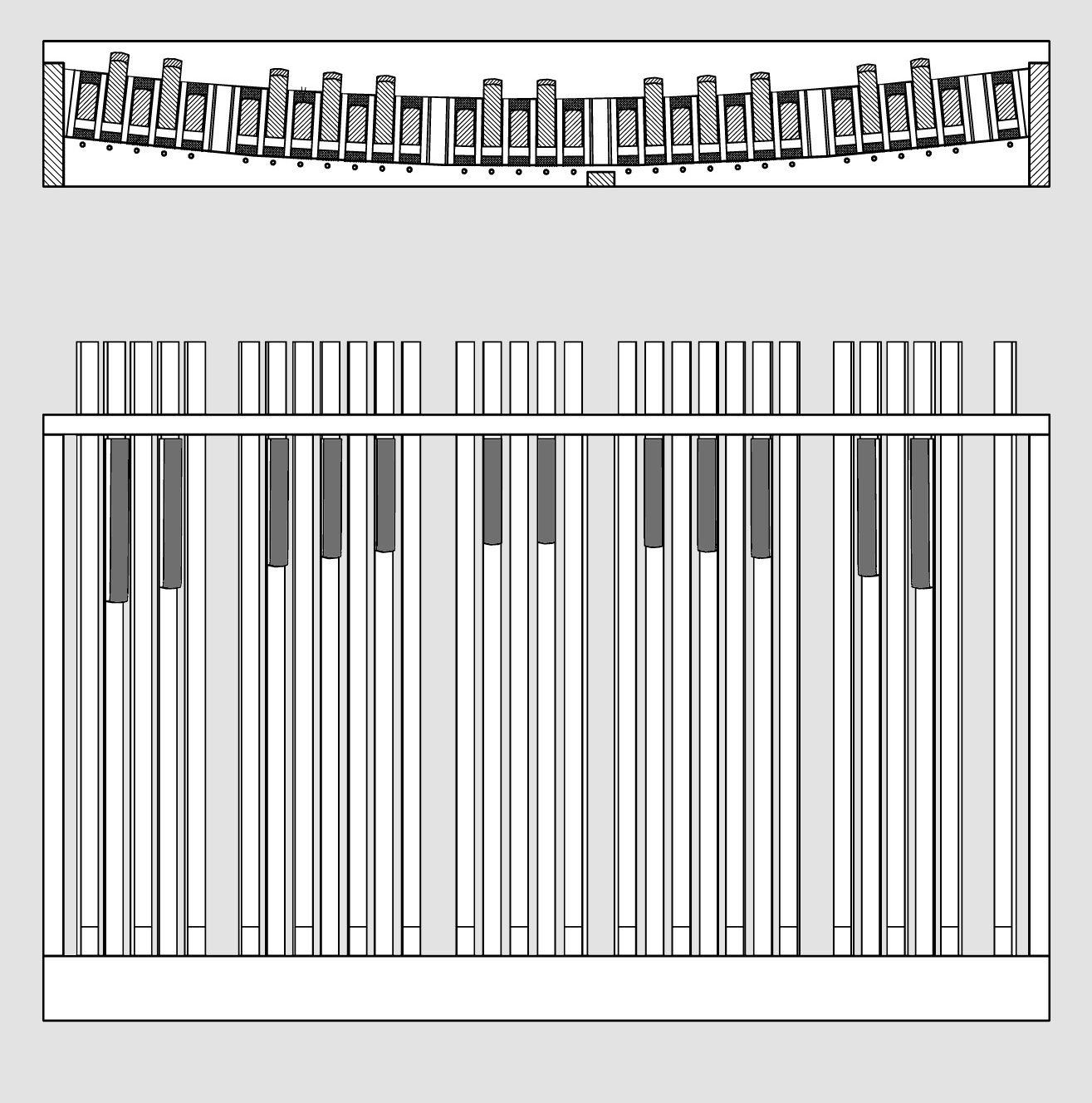 Schéma du pédalier BDO standard à marches parallèles, vue de devant et vue de dessus. 30 marches.